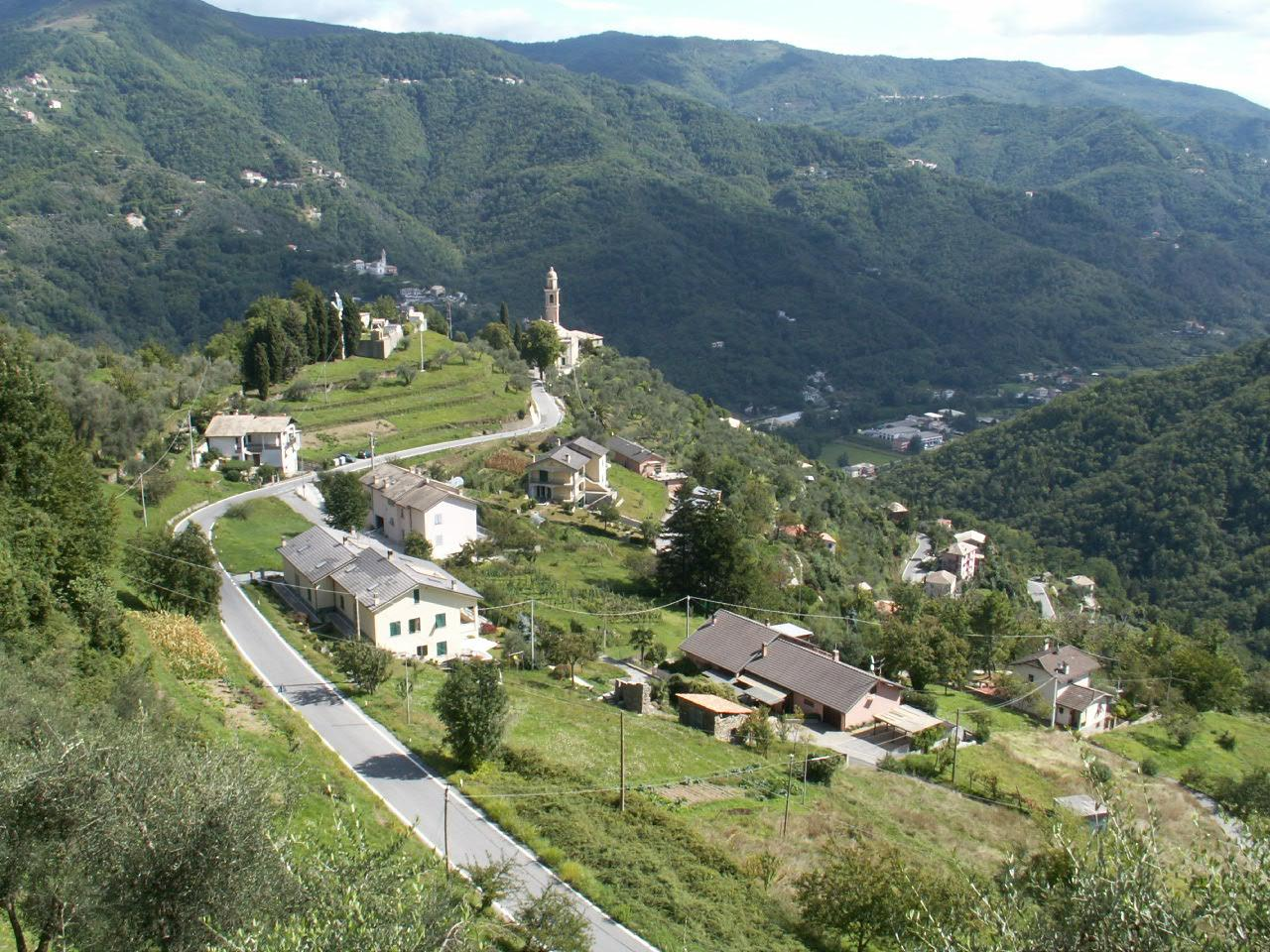 Panorama di Coreglia Ligure